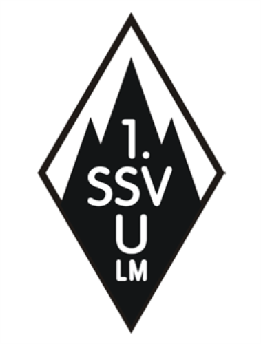 Logo SSV Ulm 1846